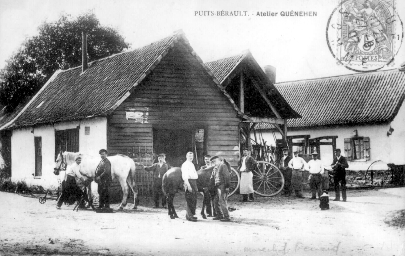 Puits-Bérault, hameau de la commune de Lépine (Pas-de-Calais, France). Carte postale ancienne datant de 1905 environ, postée à Rue (Somme, France) le 27 septembre 1907. "Atelier QUÉNEHEN". On remarque en particulier (à gauche) l'attitude de l'aide du maréchal-ferrant tenant le pied du cheval et (à droite, devant la façade de la maison) un "travail à ferrer".